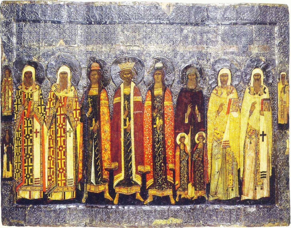 Икона избранных русских святых из собрания ЦАКа Московской духовной академии